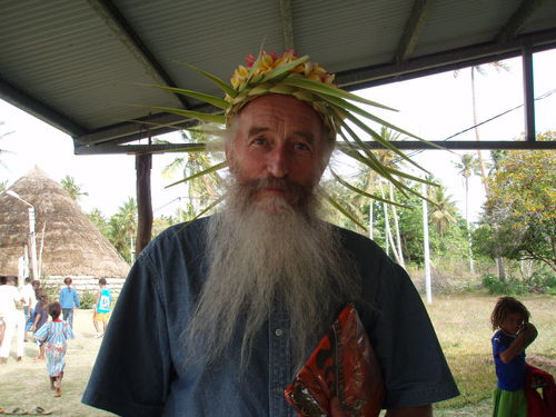 Patrik Ewen e Kanaki e 2006